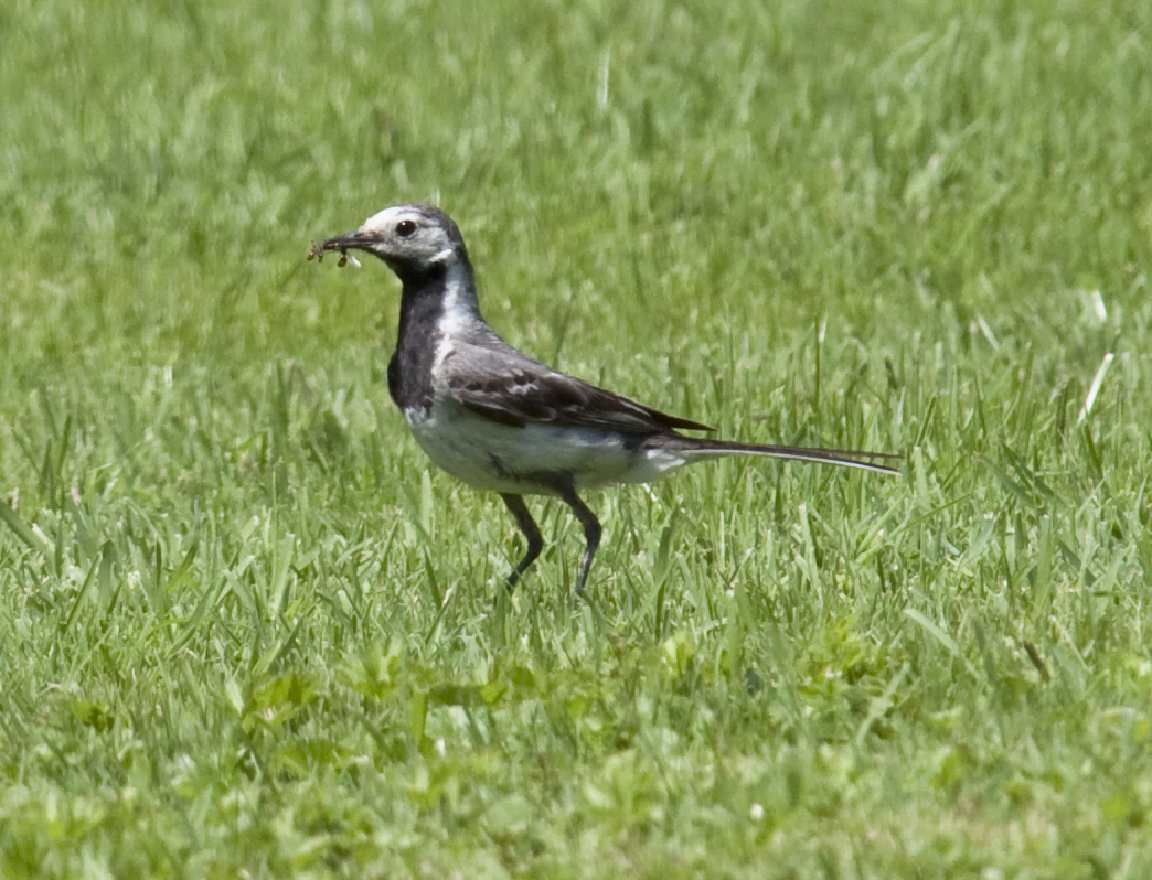 Wagtail